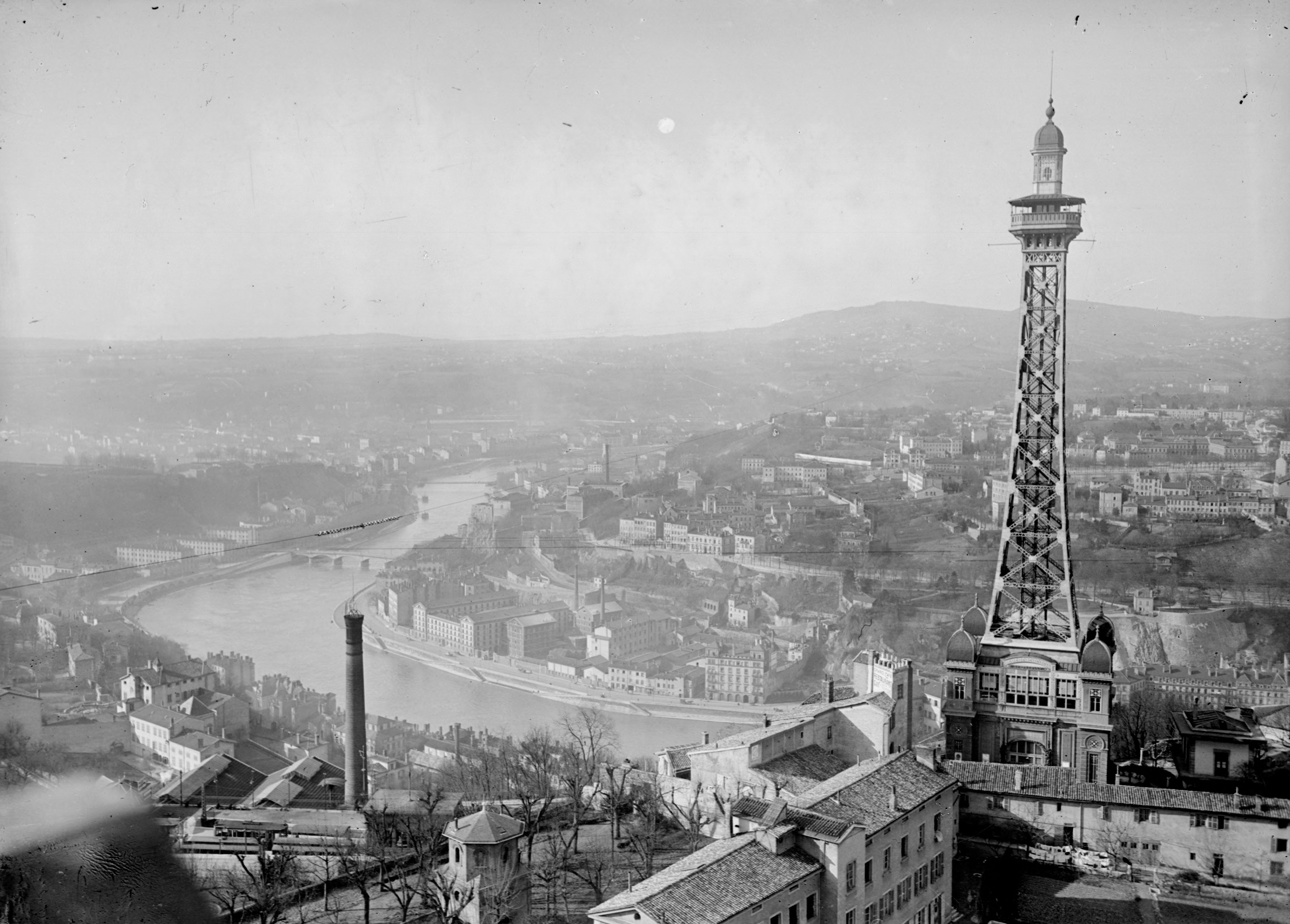 Lyon : vue depuis Fourvière.